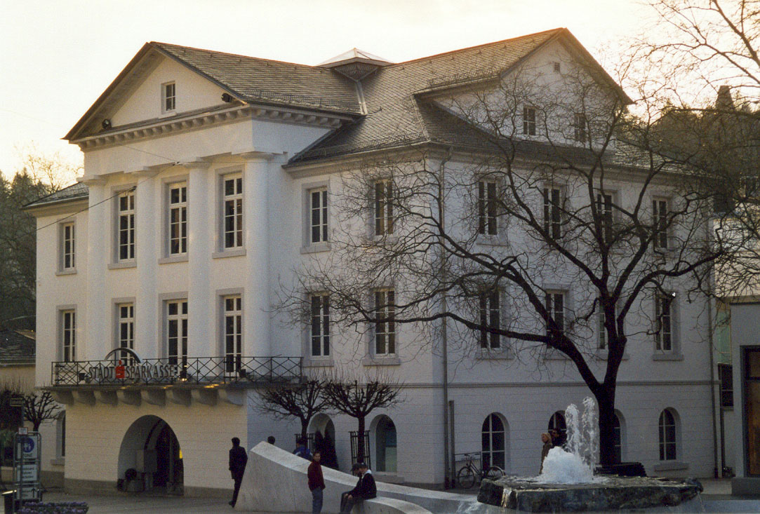 Baden-Baden. Friedrich Weinbrenners Villa Hamilton, 1809 als großherzogliches Stadtpalais ausgeführt. Beeindruckend vor allem der kraftvolle Mittelrisalit der Vorderseite.